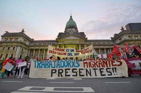 Marcha contra la xenofobia en el trabajo al frente del congreso en Argentina